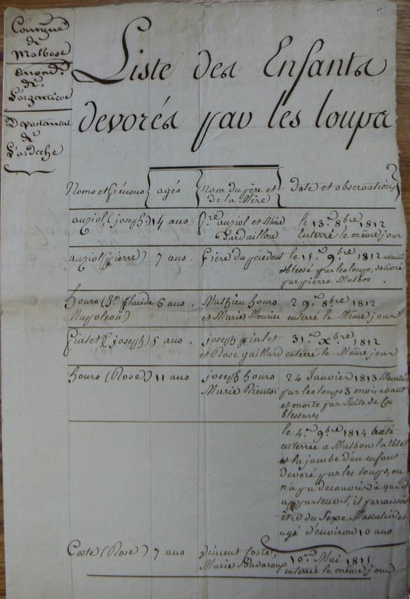 Liste d'enfants dévorés par les loups sur le territoire de la commune de Malbosc en Ardèche au début du XIXème siècle